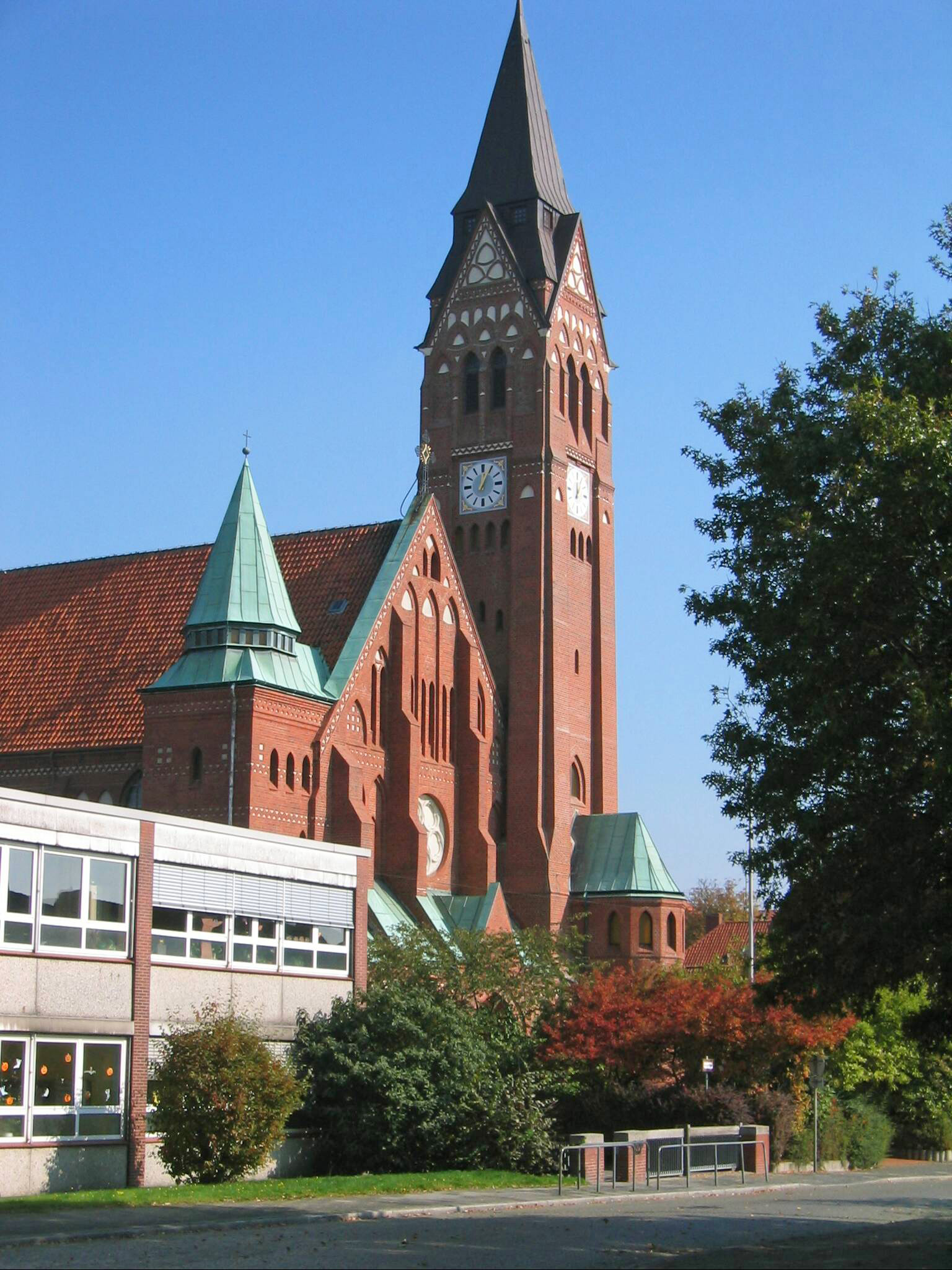 Lehe: katholische Herz-Jesu-Kirche, 1910-1911 von Maximilian Jagielski , Eupener Straße (links anschließend: katholische Schule) Das abgebildete Objekt ist ein geschütztes Kulturdenkmal in der Freien Hansestadt Bremen, mit der Nr. 1559 beim Landesamt für Denkmalpflege registriert.